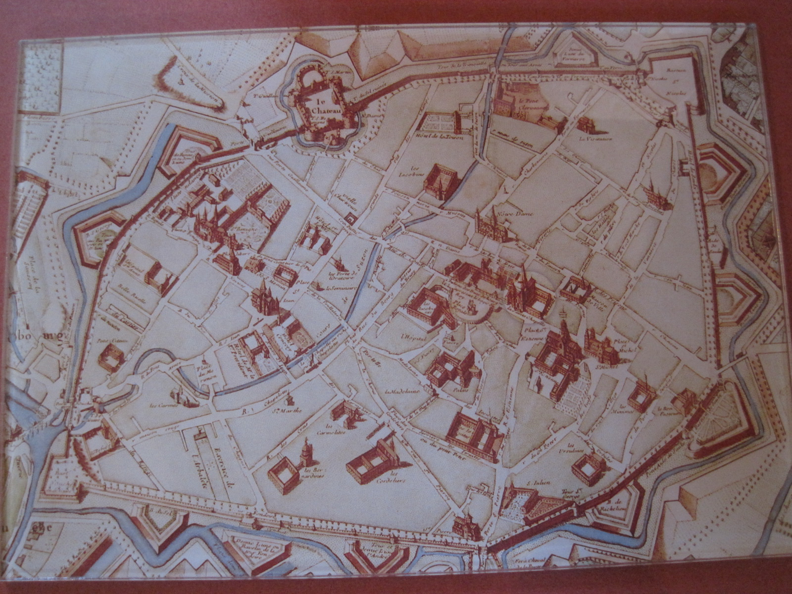 Plan de Dijon du XVe siècle avec château royale de Dijon du XVe siècle - Musée d'archéologie de Dijon